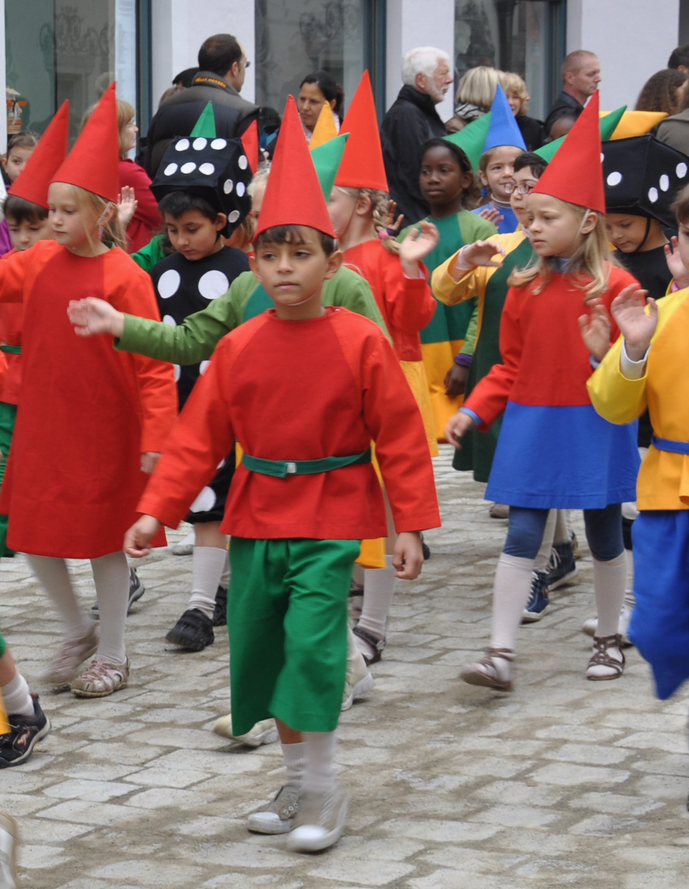 Rutenfest Ravensburg 2011, Festzug am Rutenmontag Ravensburger Spiele, Fang den Hut